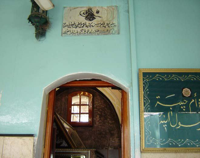 ام حبيبة